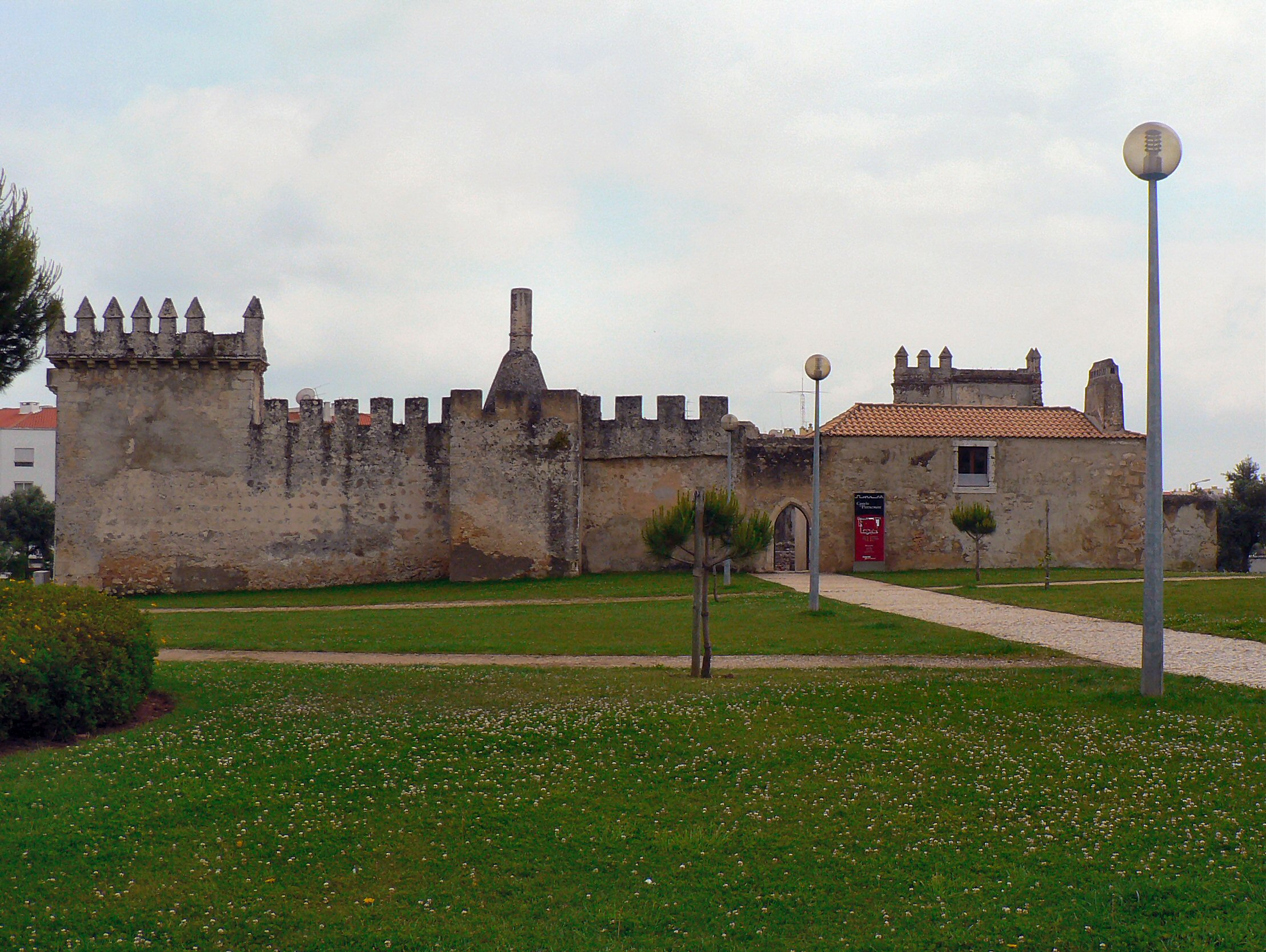 Castelo de Pirescoxe